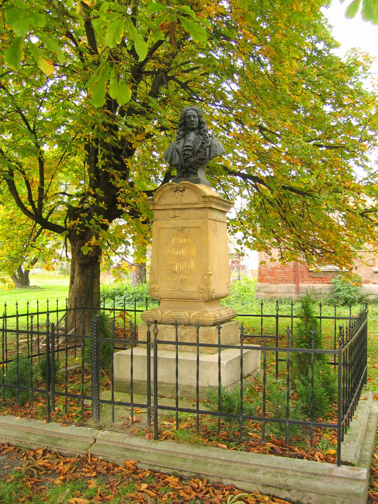 Pomník hraběte Františka Antonína Šporka v Choustníkově Hradišti, okres Trutnov